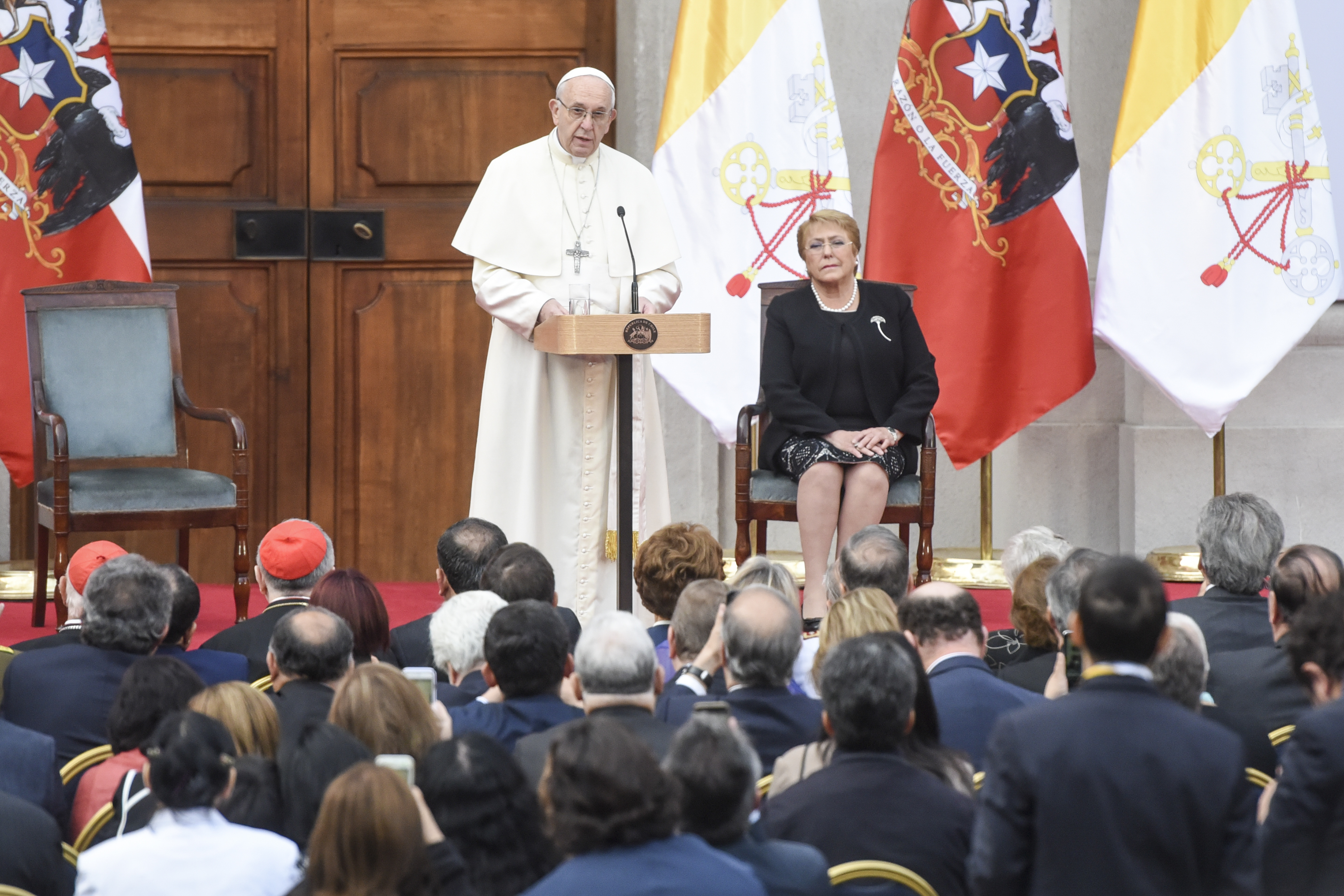 Visita del Papa Francisco a La Moneda